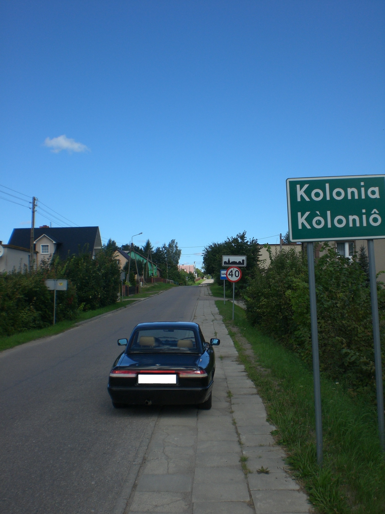 Kolonia